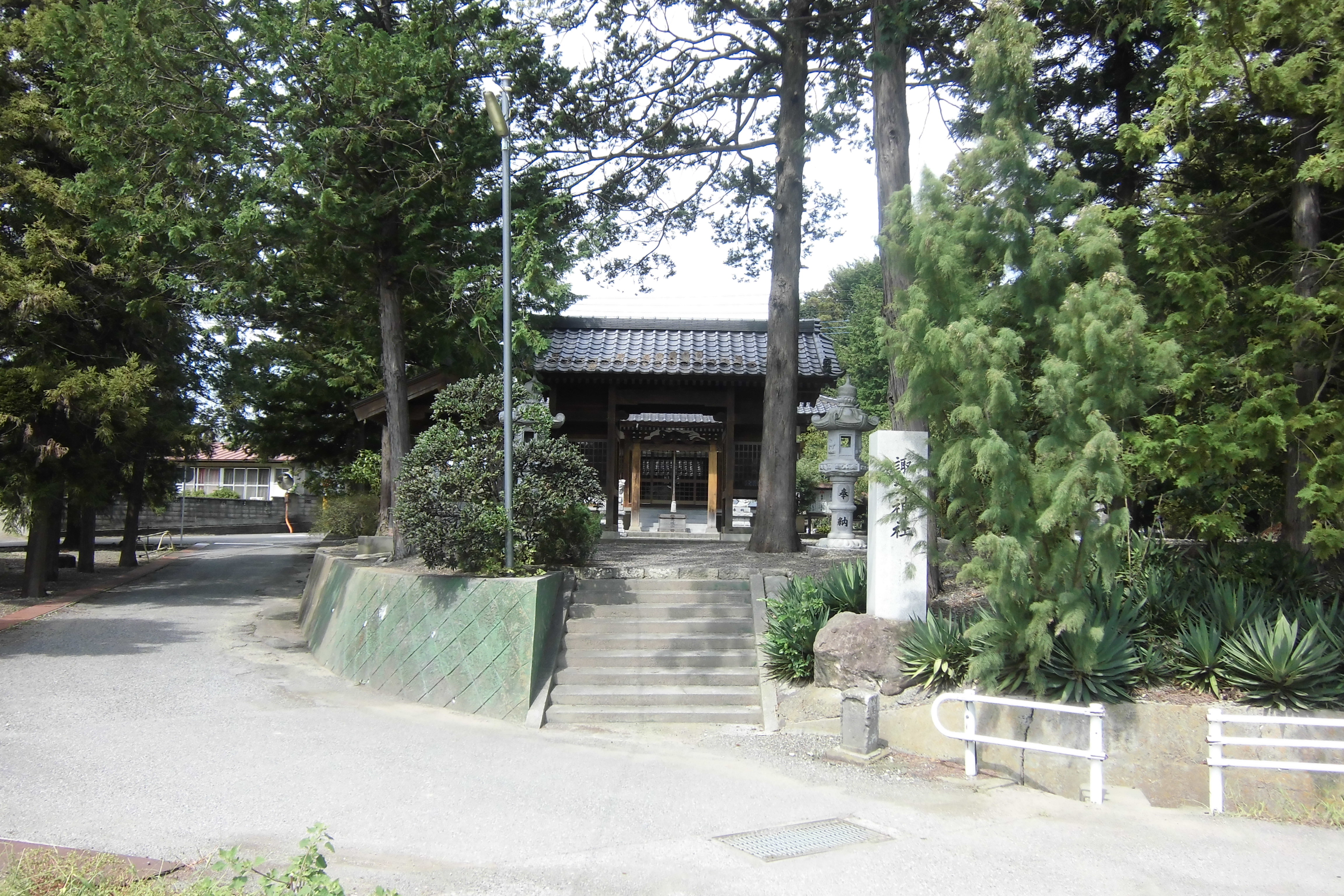 山梨県南アルプス市上八田・諏方神社